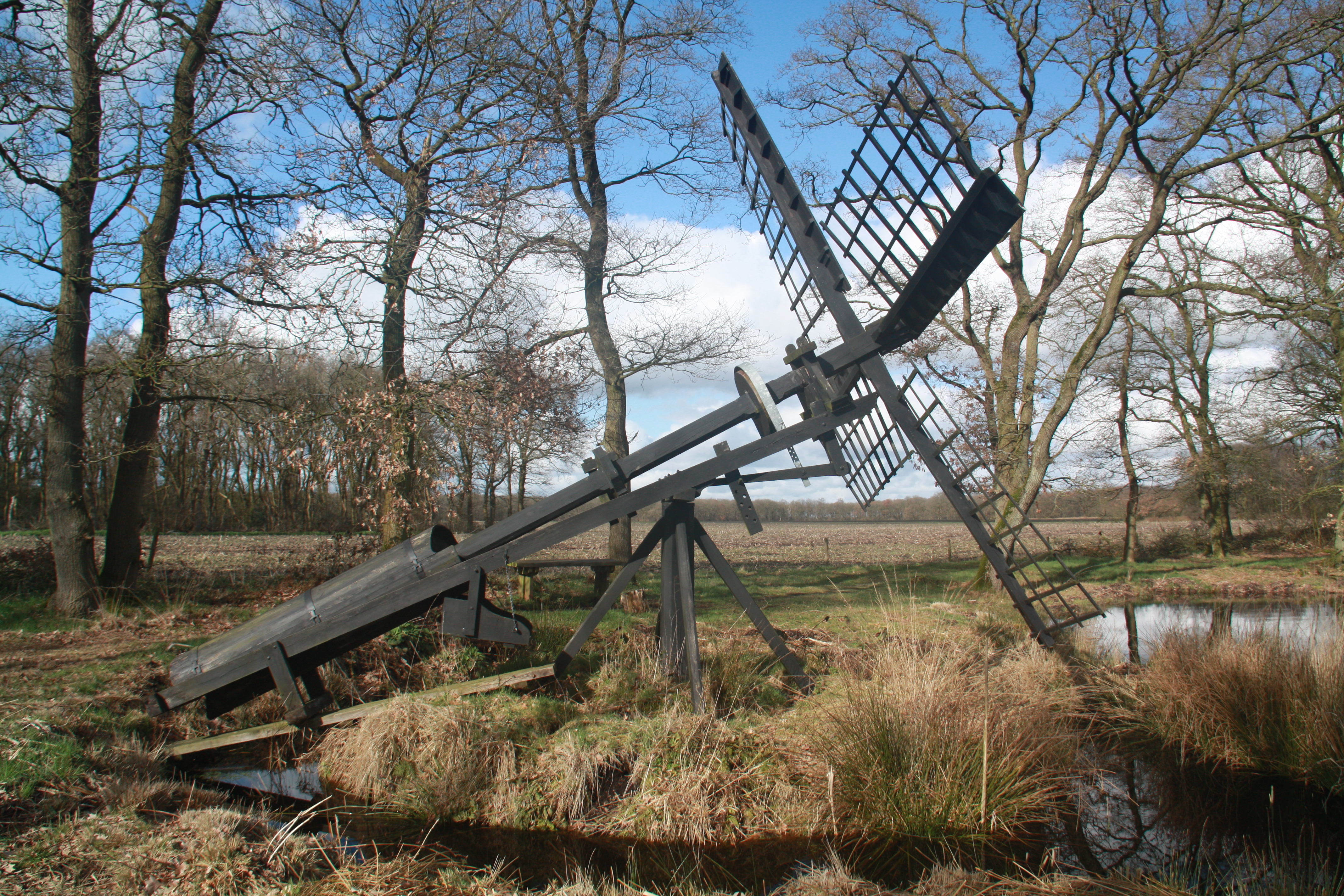 Tjasker Bollenveen